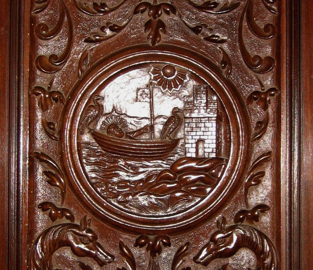 La légende de Saint-Antonin, représenté sur un fauteuil sculpté en la cathédrale de Pamiers